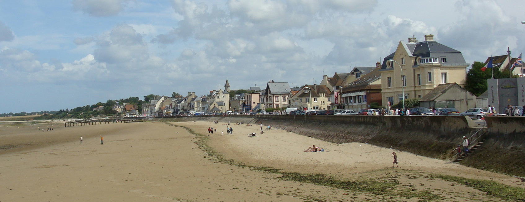 PLAGE ET CENTRE VILLE